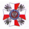 Odznaka Strzelecka ZS"S" RP